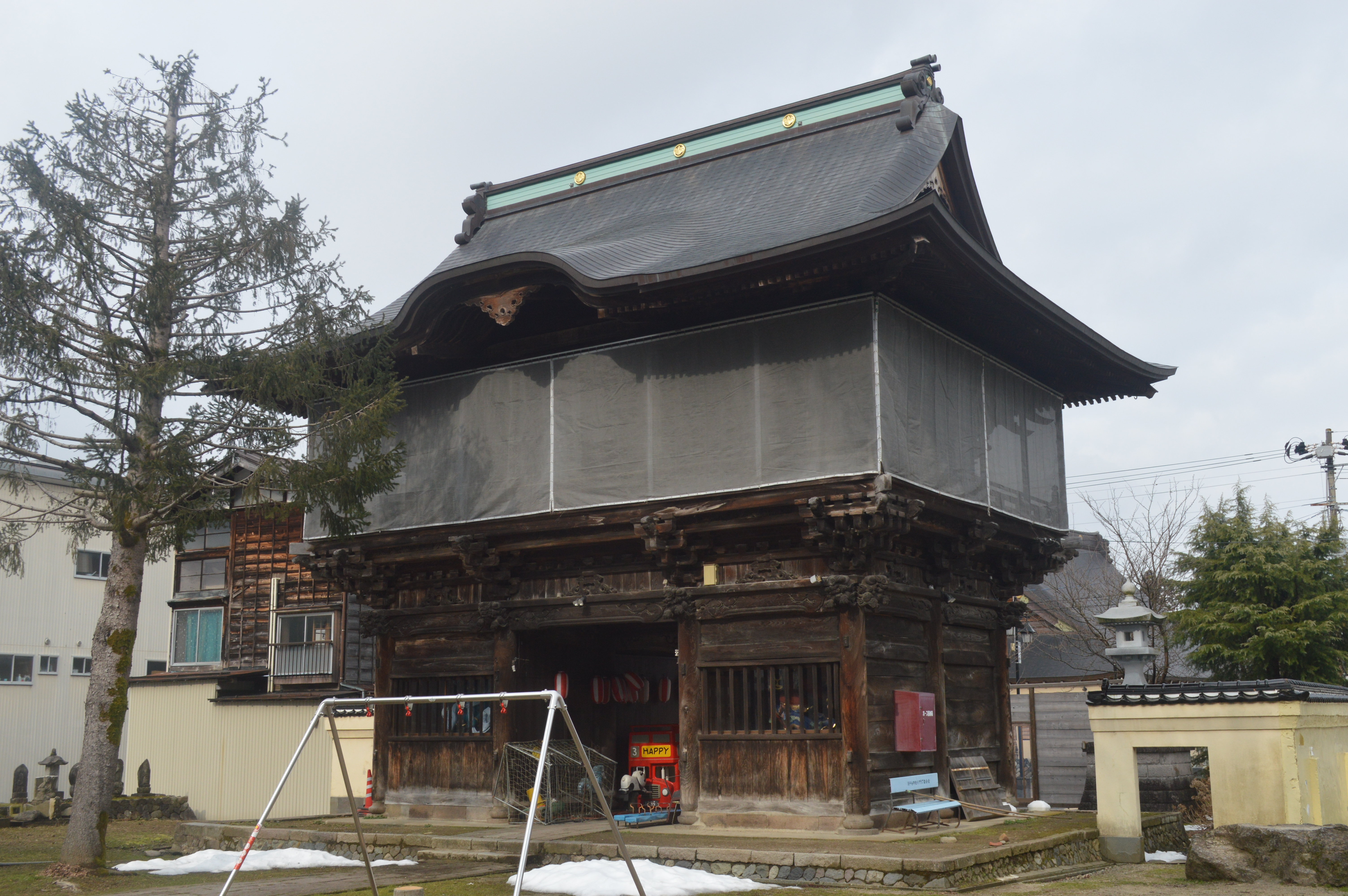 新潟県小千谷市平成2丁目3-35にある慈眼寺。山門。登録有形文化財。